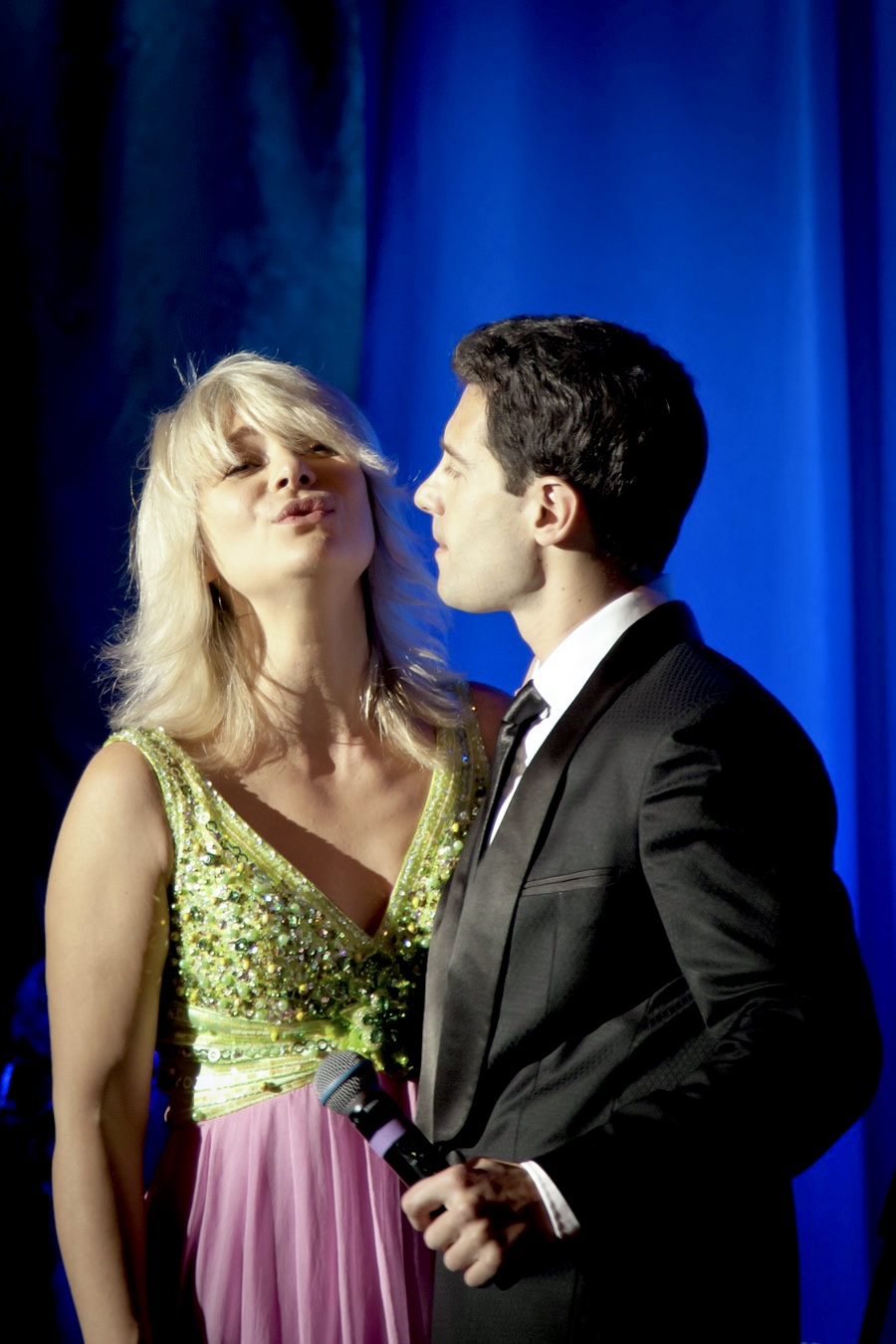 Макарские